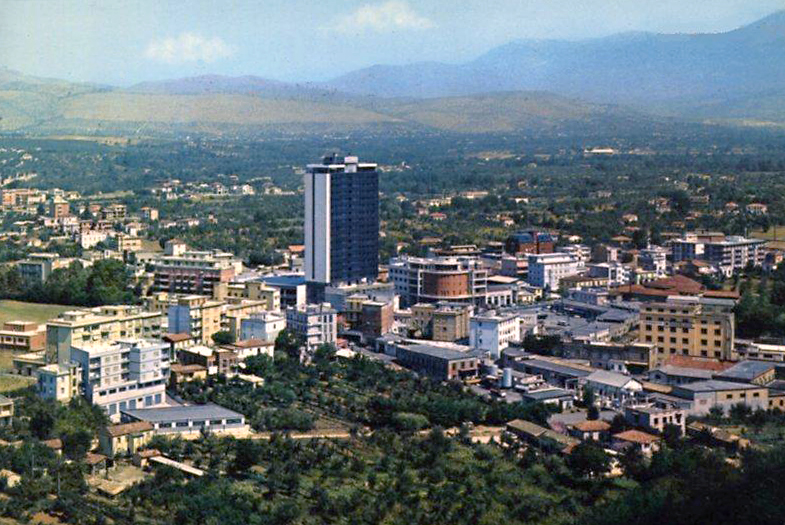 Edit di Immagini:Panorama Frosinone.jpg (bilanciamento colore, livelli, rotazione, clip)